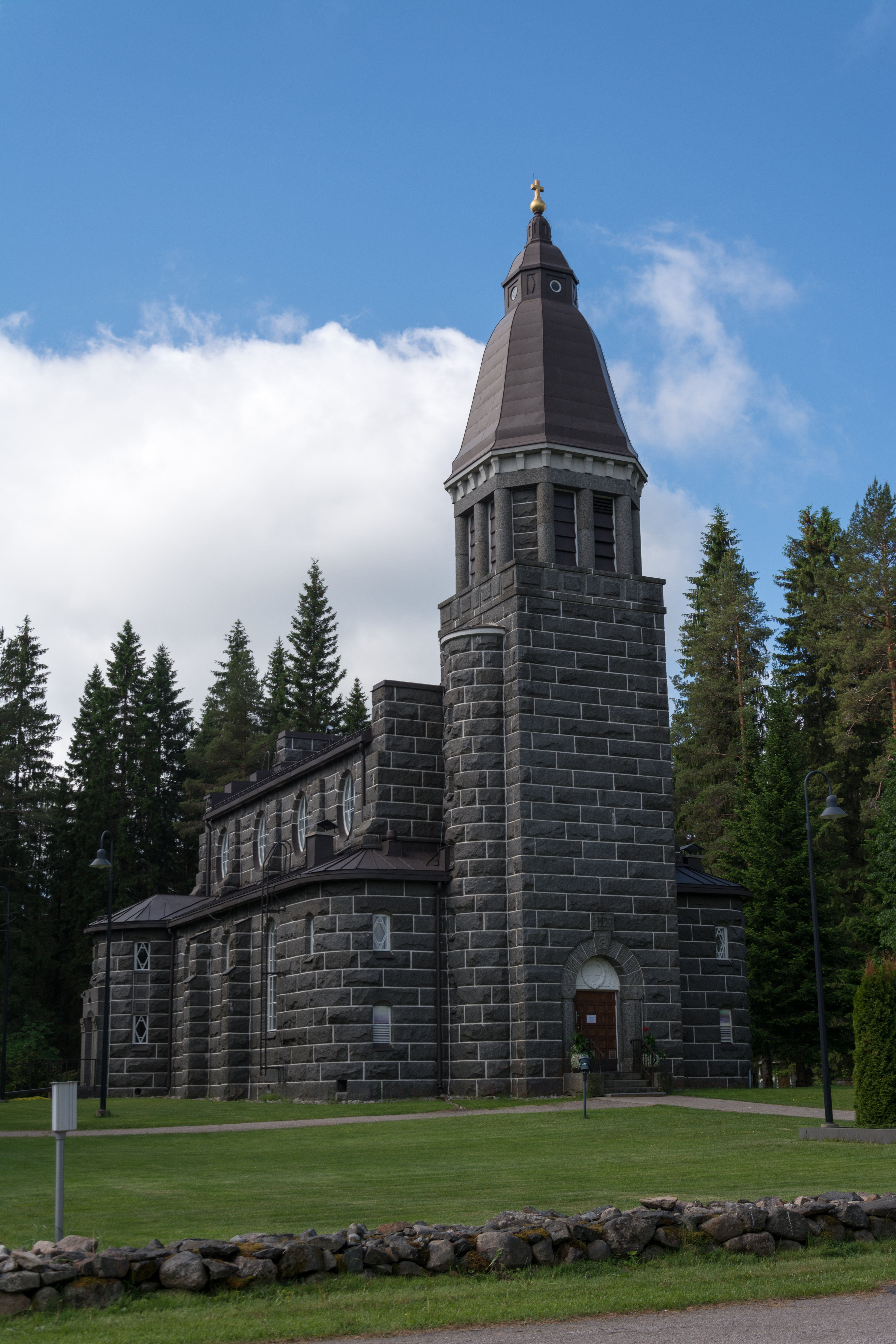 Konneveden kirkko